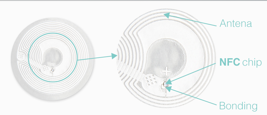 Монгол: NFC Tag-ийн дотоод бүтэц